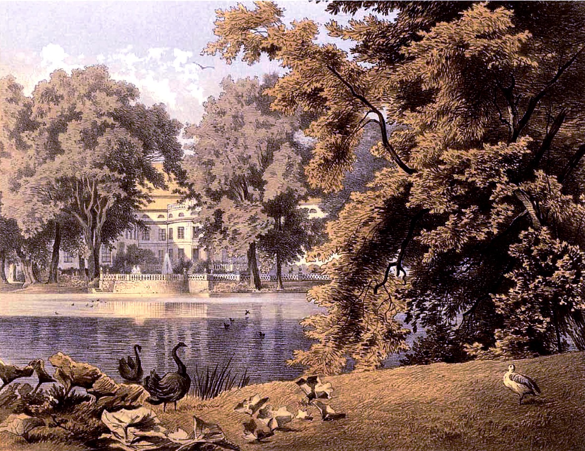 Schloss Glumbowitz, Kreis Wohlau